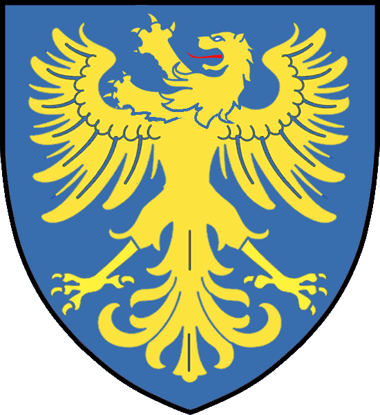 Vapensköld för svenska medeltida frälseätten Aspenäsätten